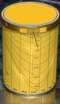 Modell einer Zylindersonnenuhr